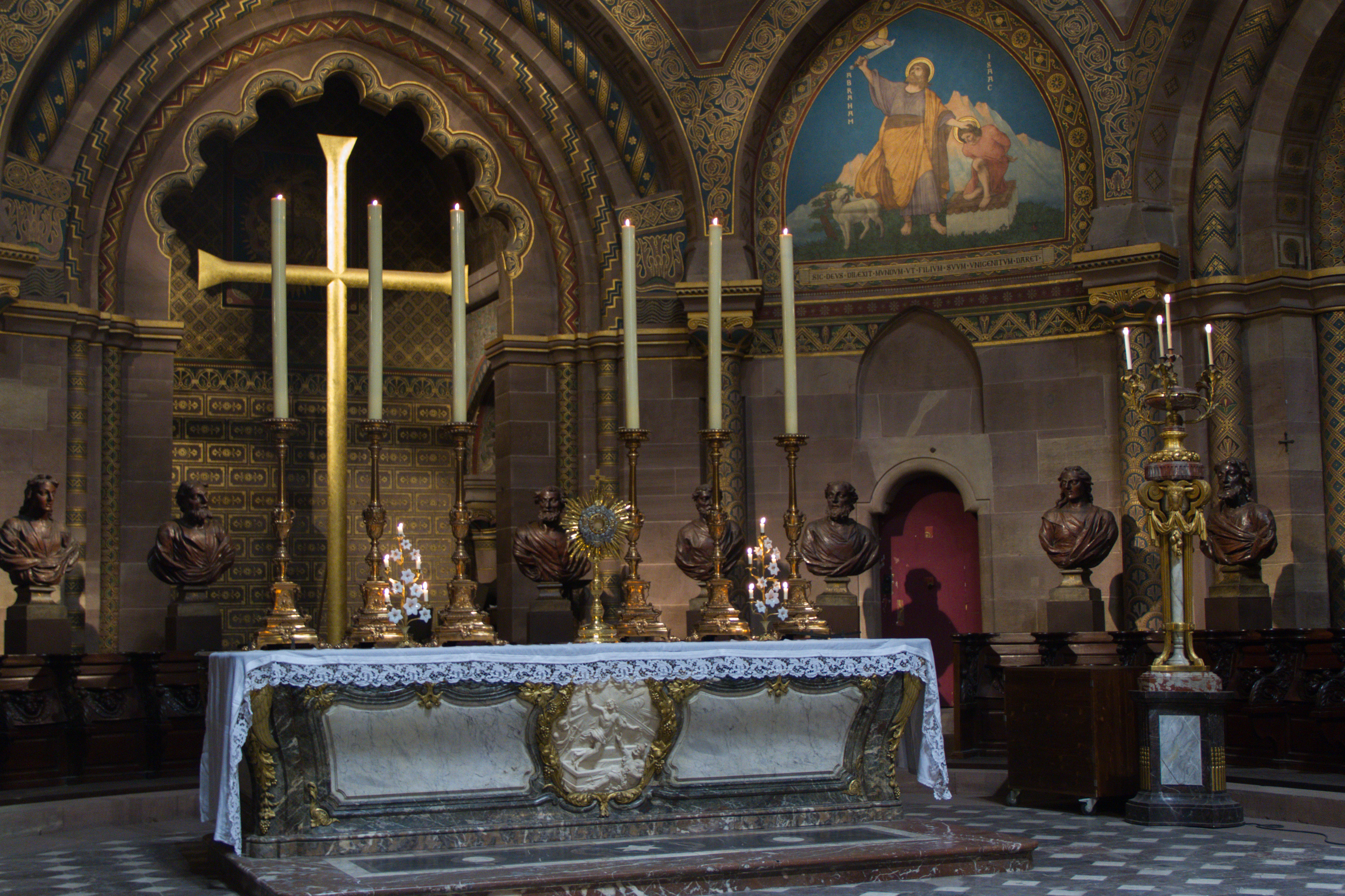 Strasbourg Cathédrale Notre-Dame. Le Maître-Autel sur lequel sont posés six chandeliers d'autel. Ensemble exécuté vers 1765 par Massol J. (?, auteur du modèle) ; Eberle (bronzier)